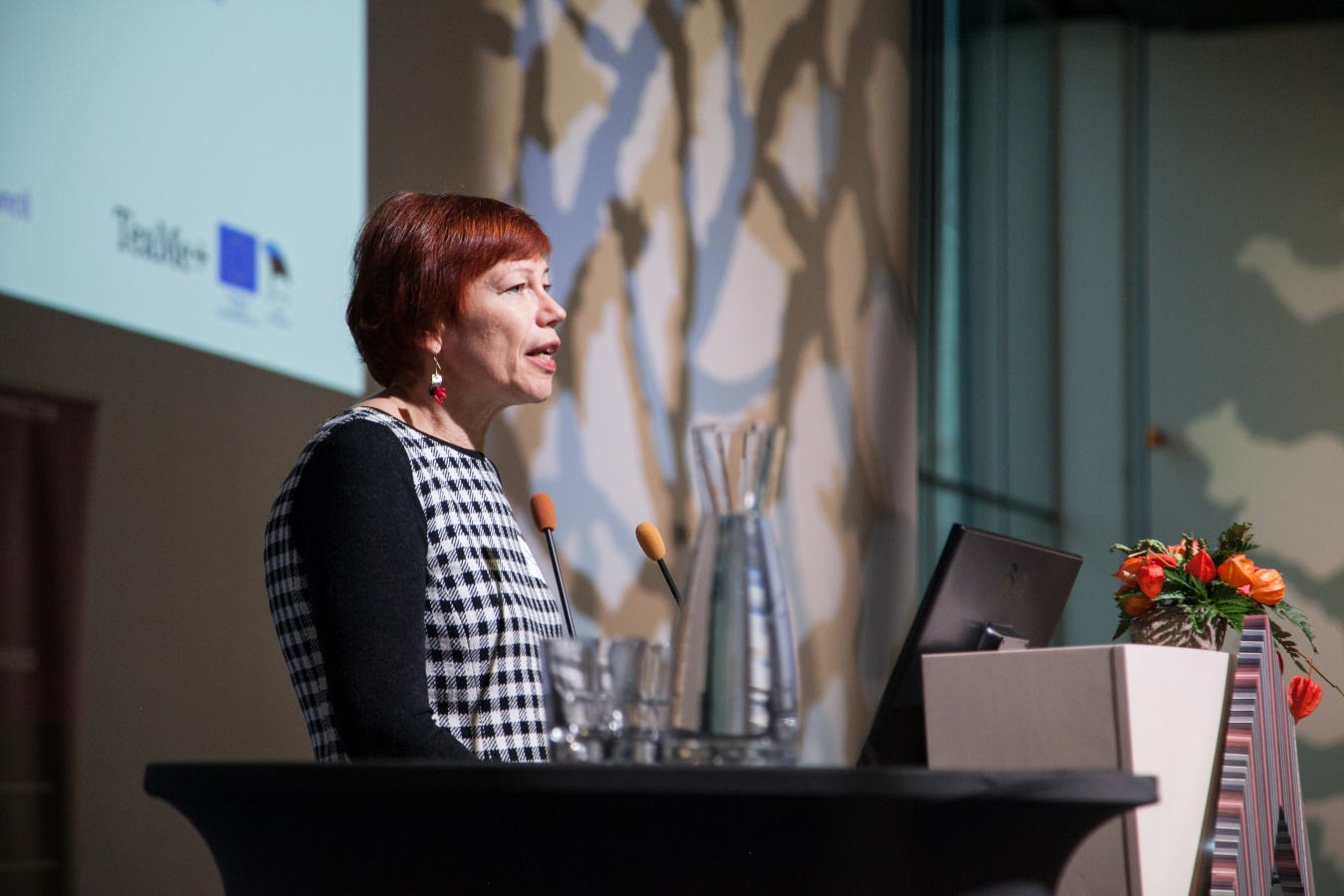 SA Eesti Teadusagentuuri tegevjuht Karin Jaanson 2016. aasta teaduskommunikatsiooni konverentsil.